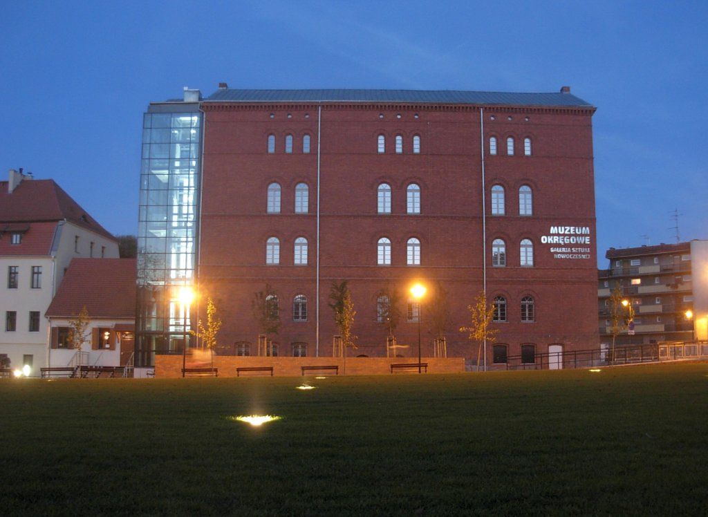 Czerwony Spichlerz na Wyspie Młyńskiej w Bydgoszczy